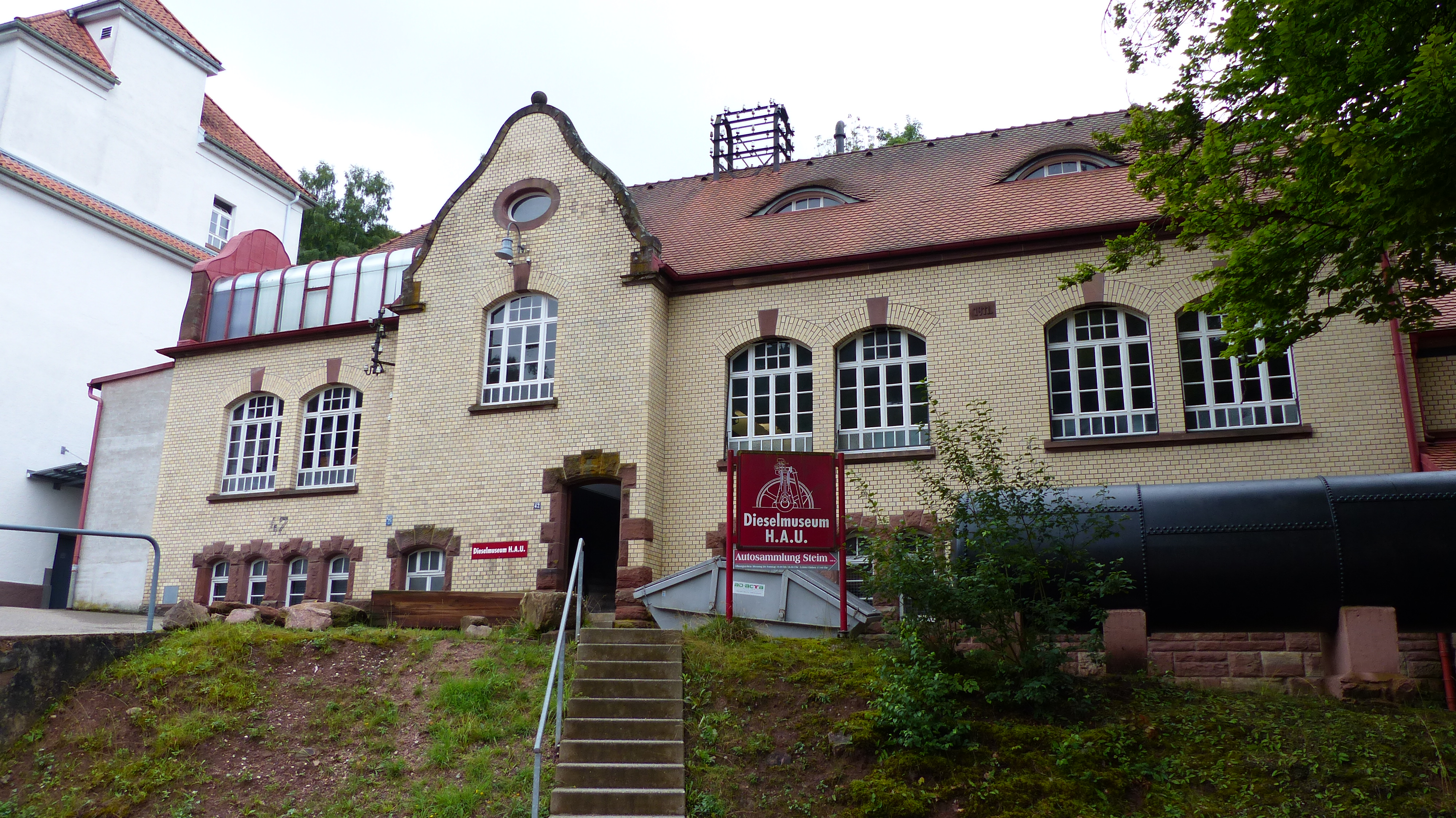 Dieselmuseum im Gewerbepark H.A.U. an der Oberndorferstraße in Schramberg